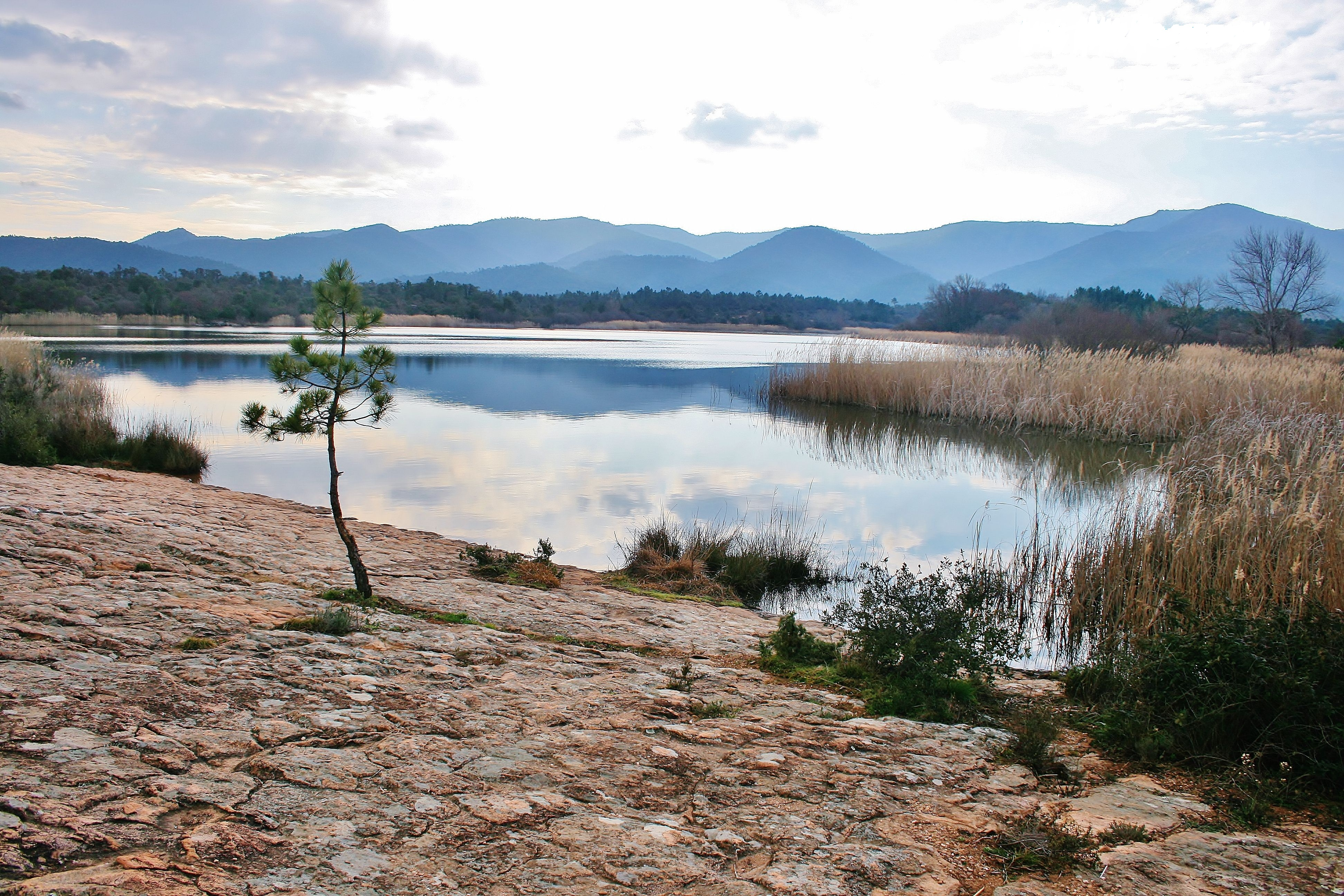 Lac des Escarcets, vu de la rive Ouest.